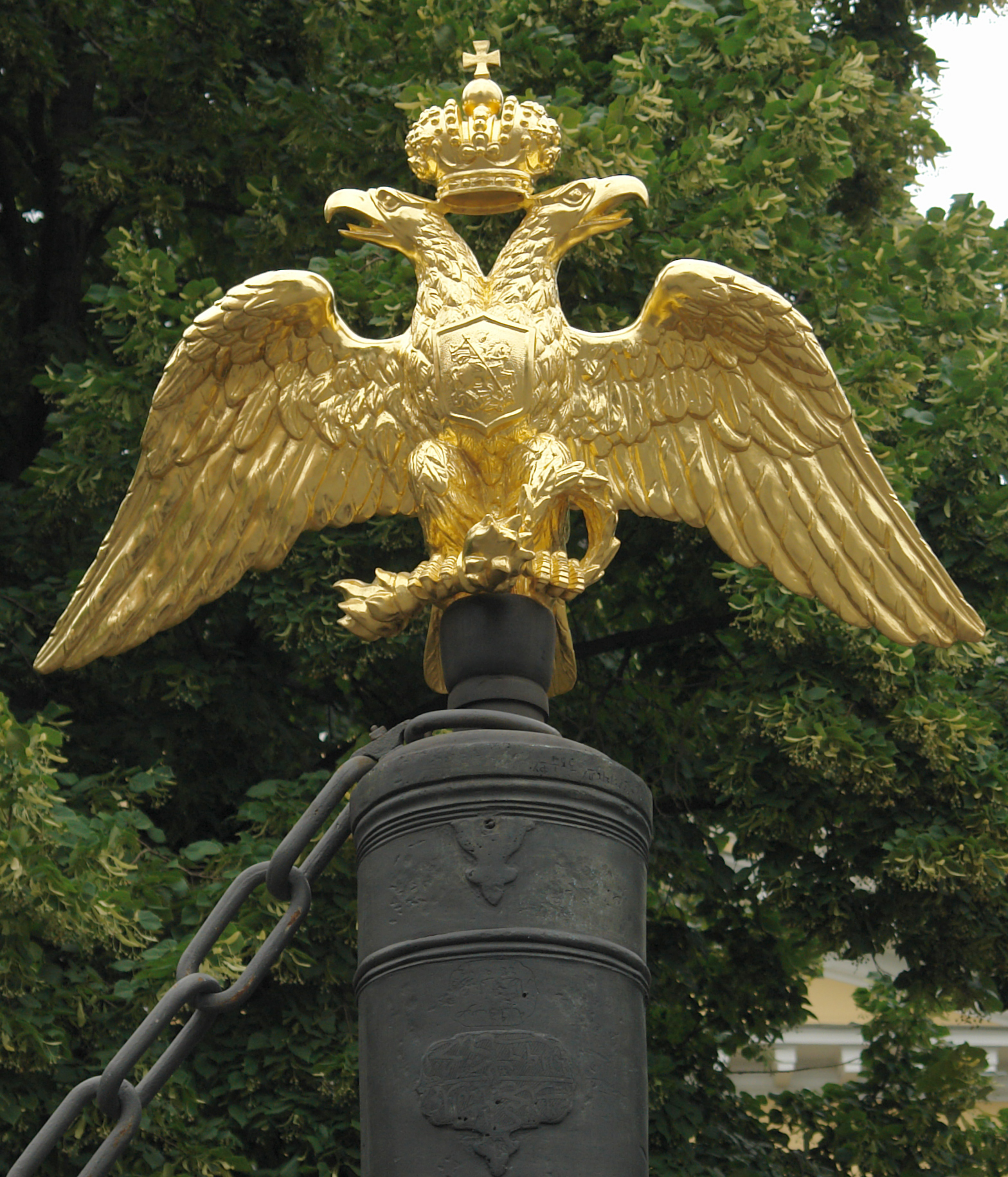 Двухглавый_орёл_на_ограде_Спасо-Преображенского_собора (на ограде центрального входа, остальные орлы по периметру незолочёные). Санкт-Петербург, Россия.